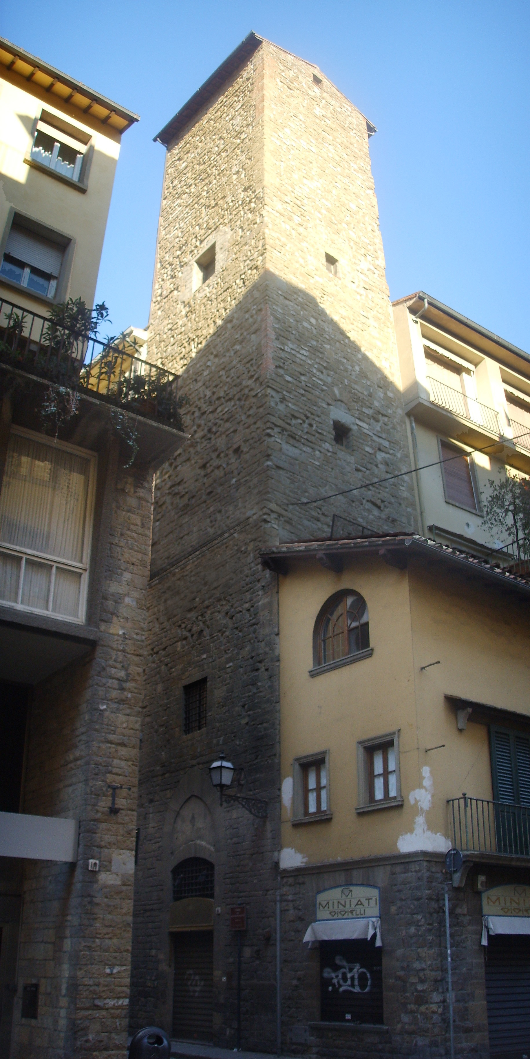 Torre_dei_Baldovinetti in Florence, italy